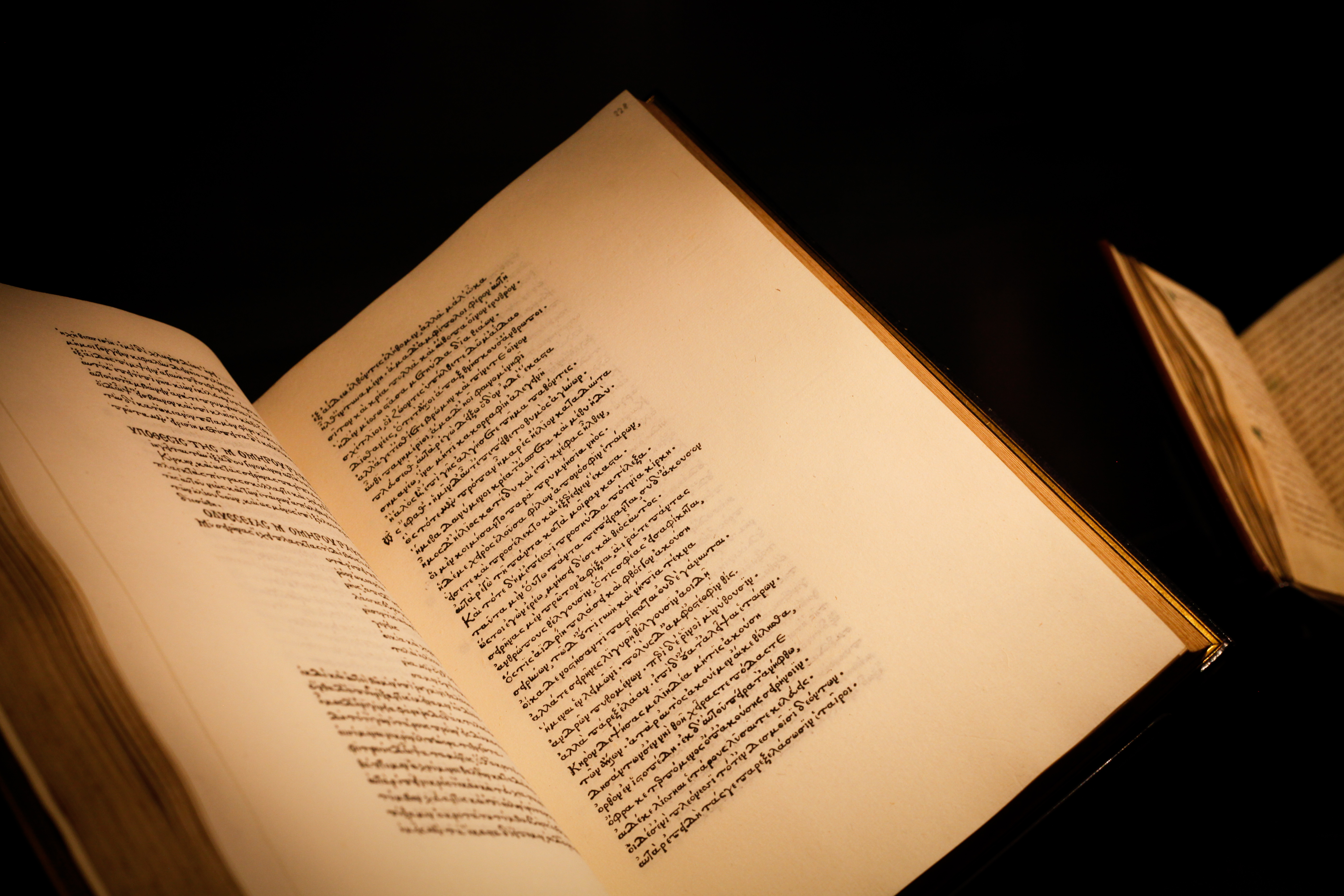 Homère, Odyssée, Florence, Bernardus et Nerius Nerlius, 9 décembre 1488, édition princeps grecque (Inc. B 126). [Ouverture : début du chant XIII : le retour à Ithaque]. Depuis les vitrines de l'exposition permanente de la Fondation Martin Bodmer. (Photo Naomi Wenger).